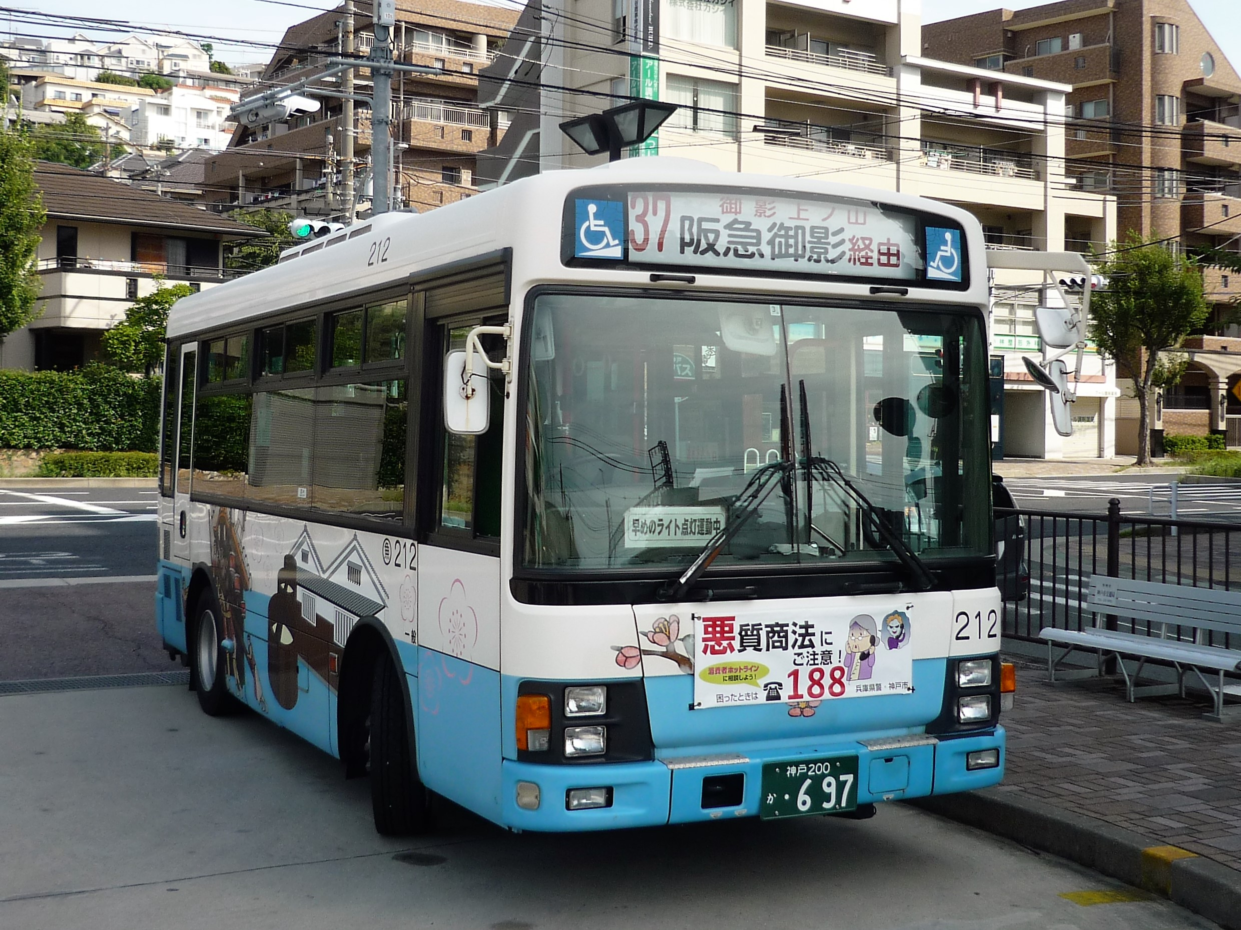 甲南山手駅前に停車中の神戸市バス37系統